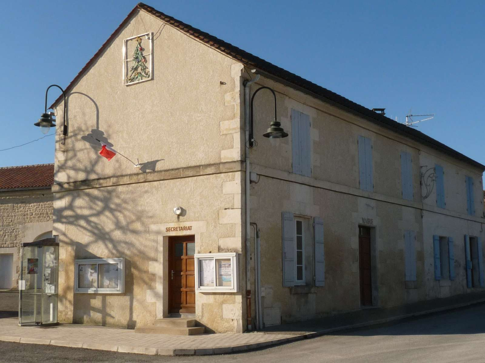 mairie de Champmillon, Charente, France